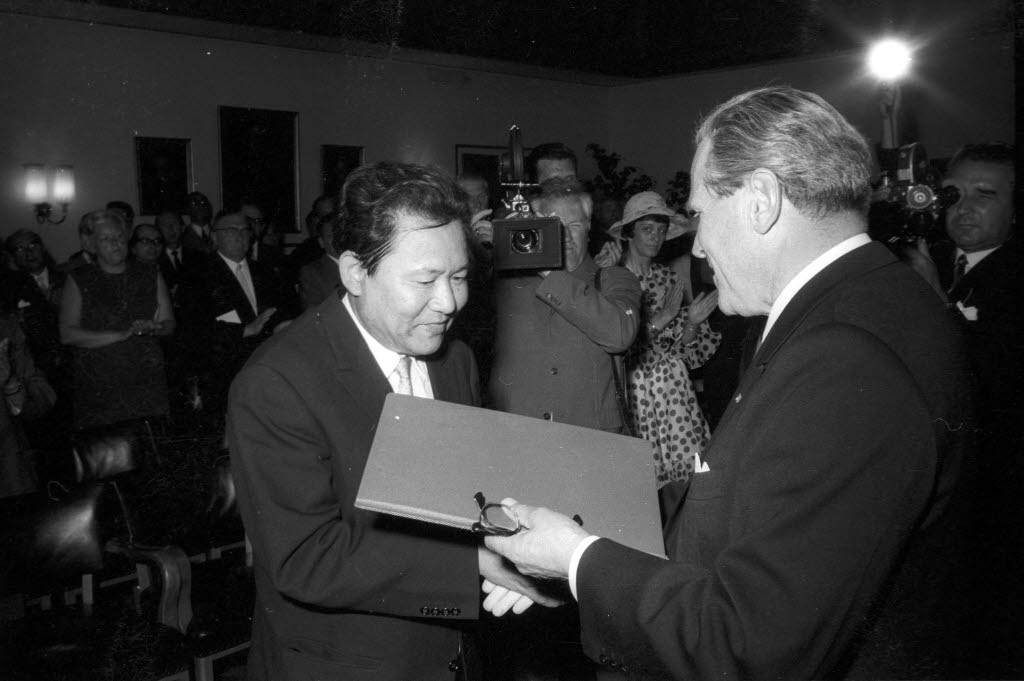 Stadtpräsident Hermann Köster überreicht die Preisurkunde an den koreanischen Komponisten.